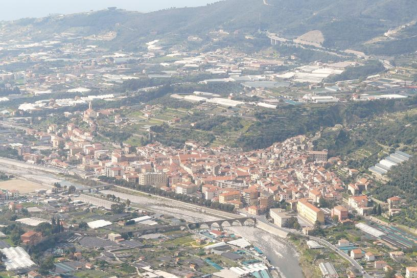 Panorama di Taggia, Liguria, Italia